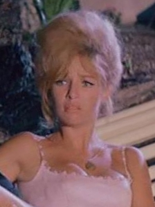 Annette Strøyberg Vadim